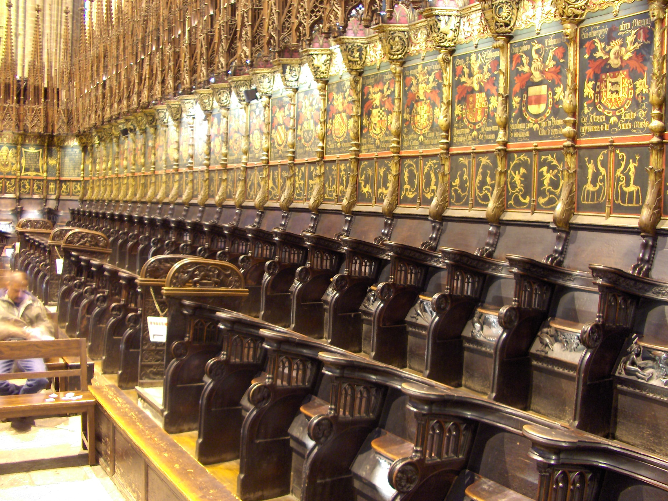 Cor de la catedral de Barcelona, Catalunya.